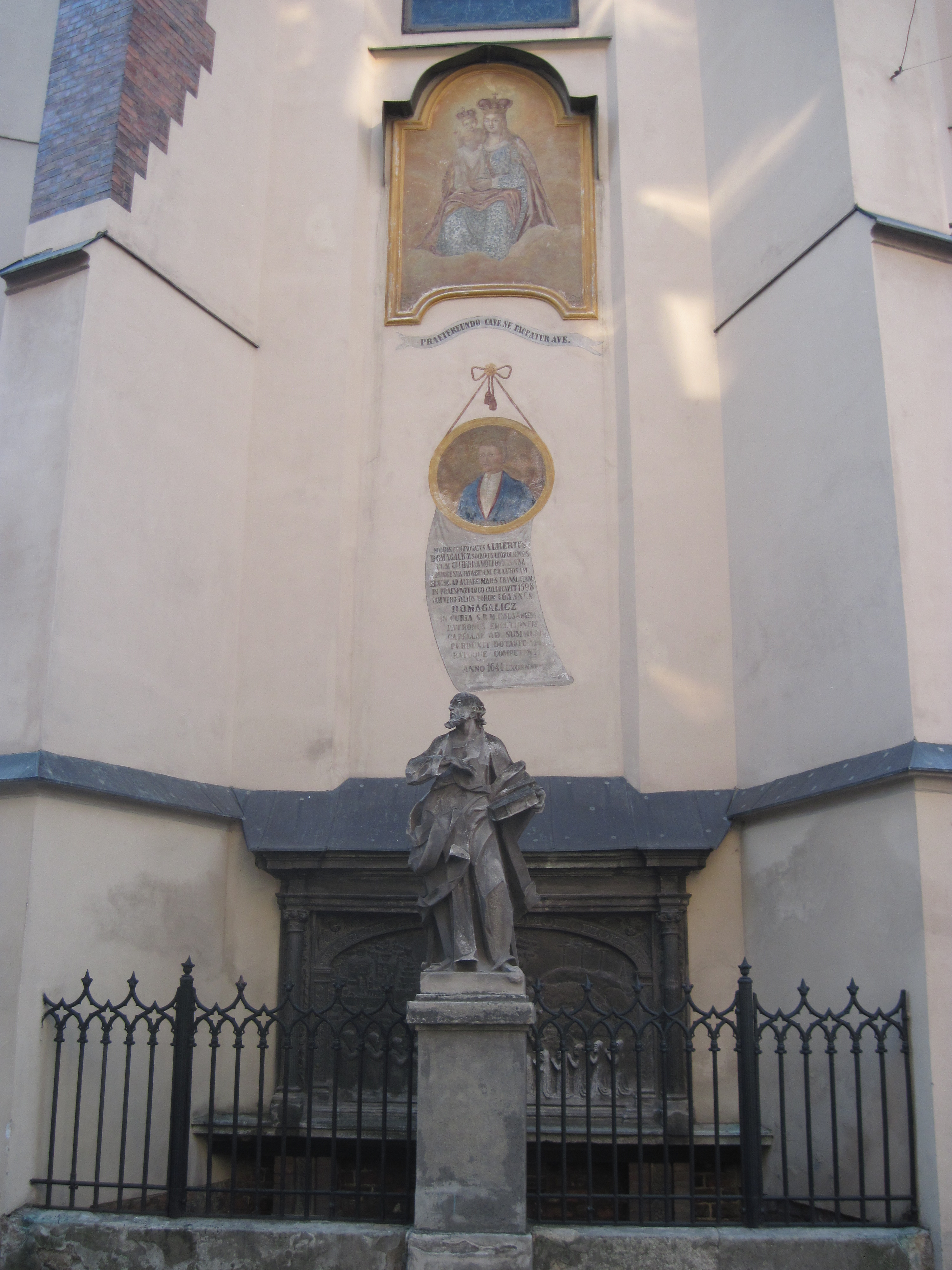 каплиця Домагалічів